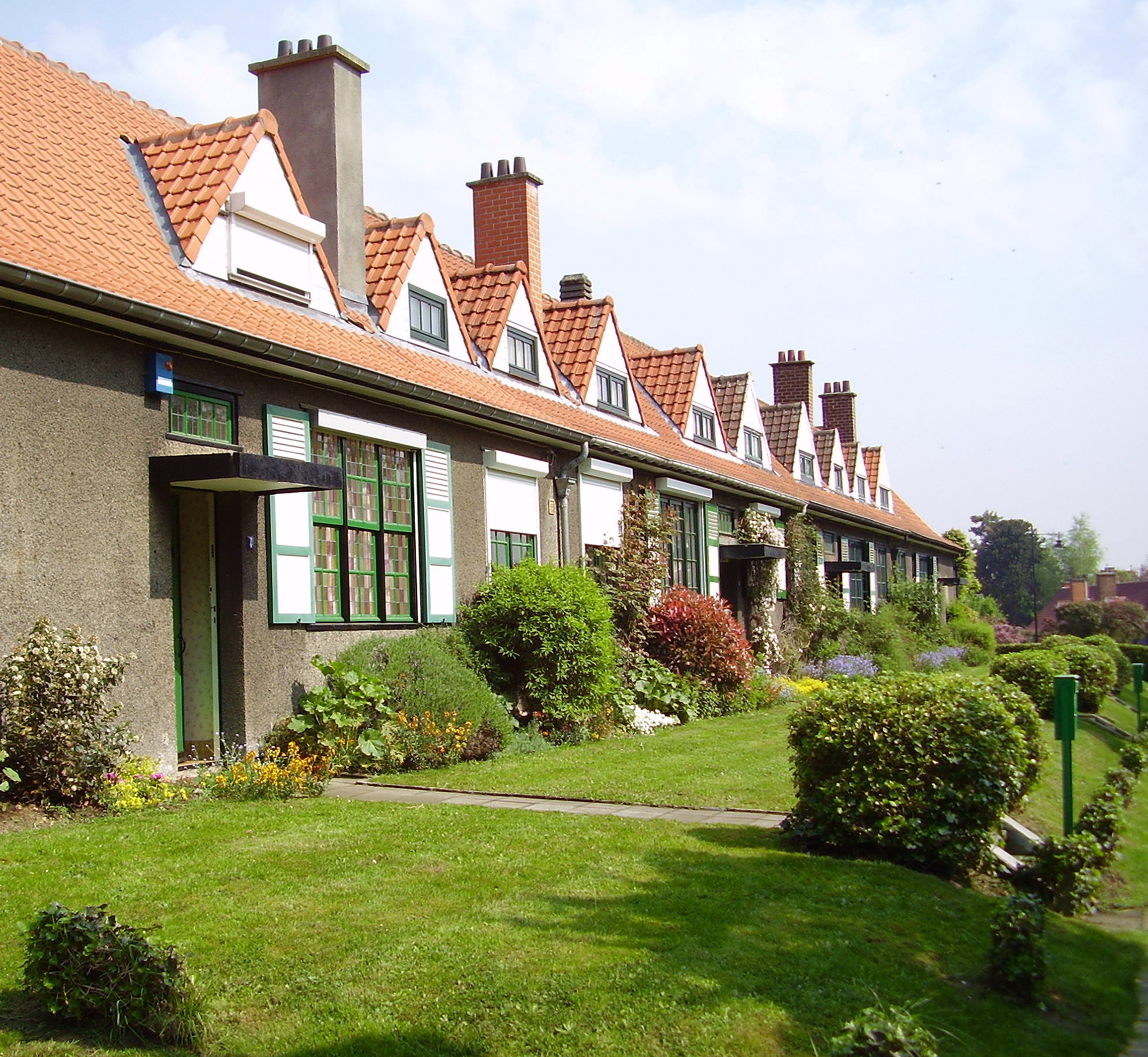 Cité-jardin Le Logis, Watermael-Boitsfort (Bruxelles)